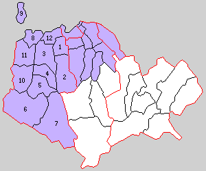 福岡県早良郡の町村制時点の町村。